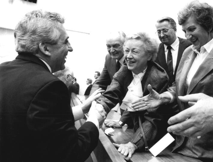 ADN-ZB Mittelstädt 24.10.1989 Berlin: VK-Tagung Die Volkskammer der DDR trat zu ihrer 10. Tagung zusammen. Auf Antrag der SED-Fraktion erfolgte die Wahl in die höchsten Staatsämter. Nach seiner Wahl zum neuen Vorsitzenden des Staatsrates und des Nationalen Verteidigungsrates der DDR gratulierten viele Abgeordnete dem Generalsekretär des ZK der SED, Egon Krenz. V.r. Inge Lange, Johanna Töpfer, Klaus Sorgenicht